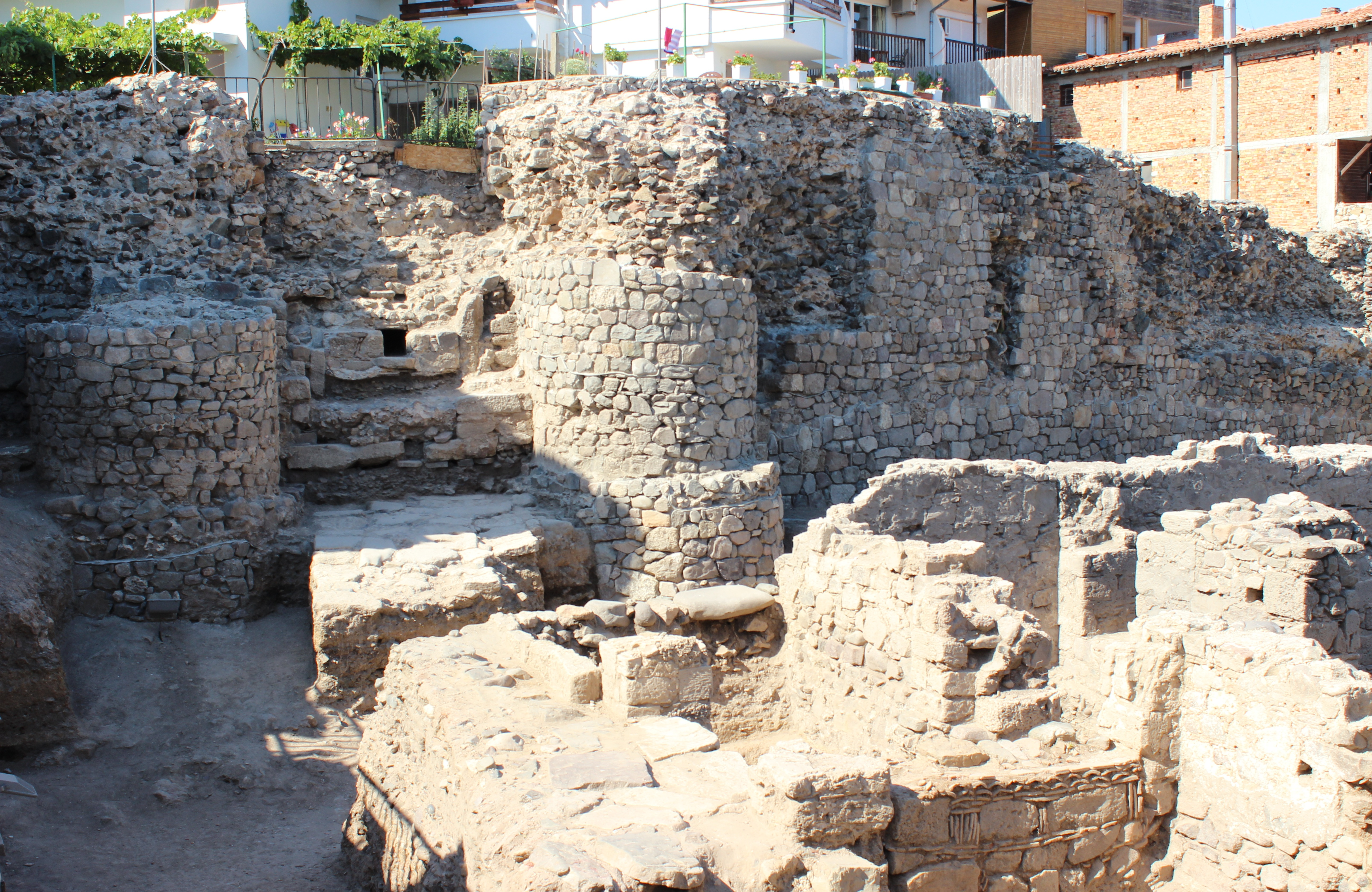 Südtor der Festungsmauern mit der mittelalterliche, einschiffige Nikolaus-Kirche